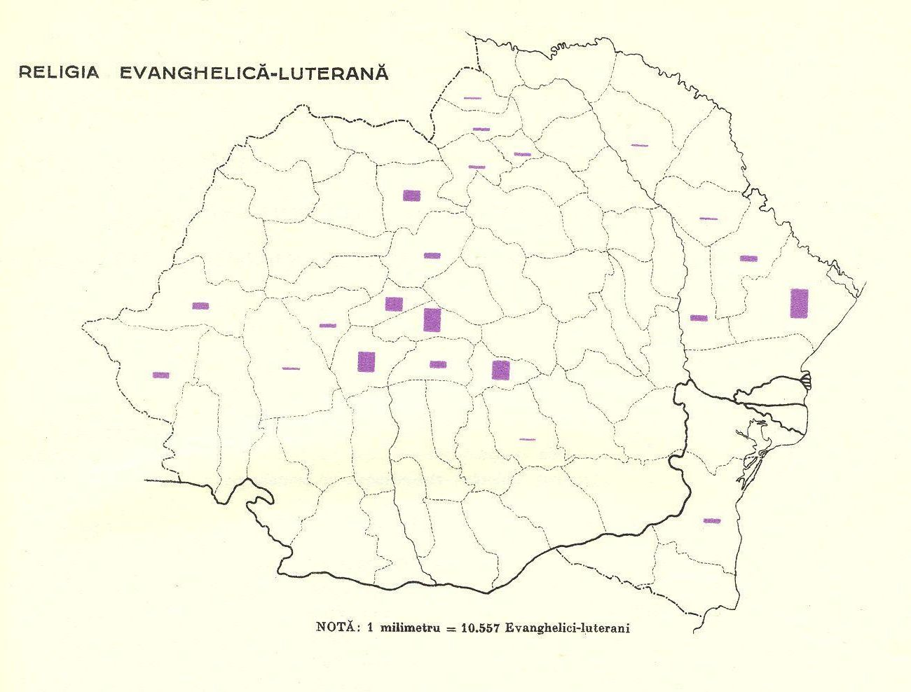 Numărul de evanghelici-luterani pe regiuni, conform recensământului populației din 1930